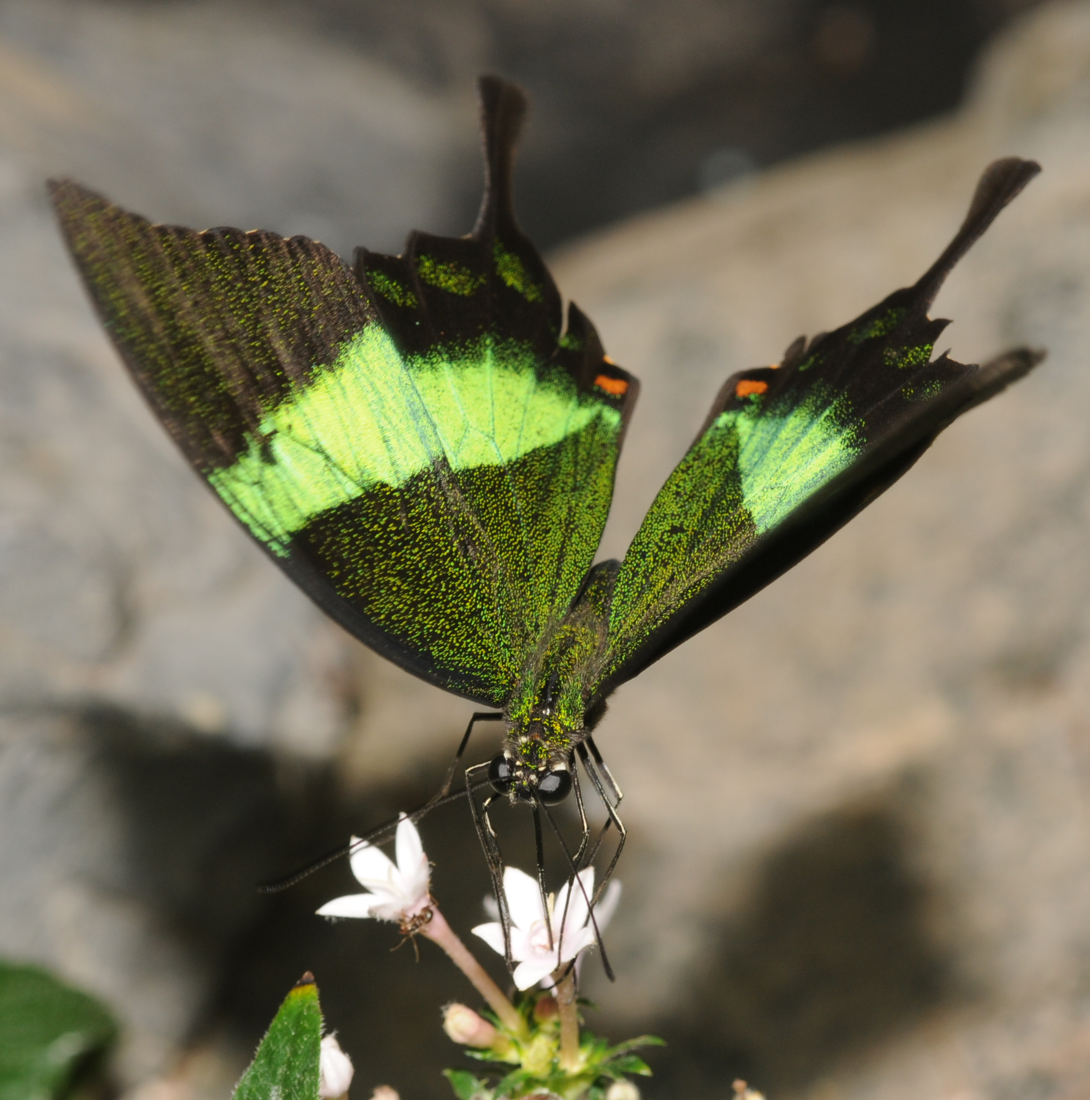 Machaon émeraude. Jardin des papillons, Hunawihr.